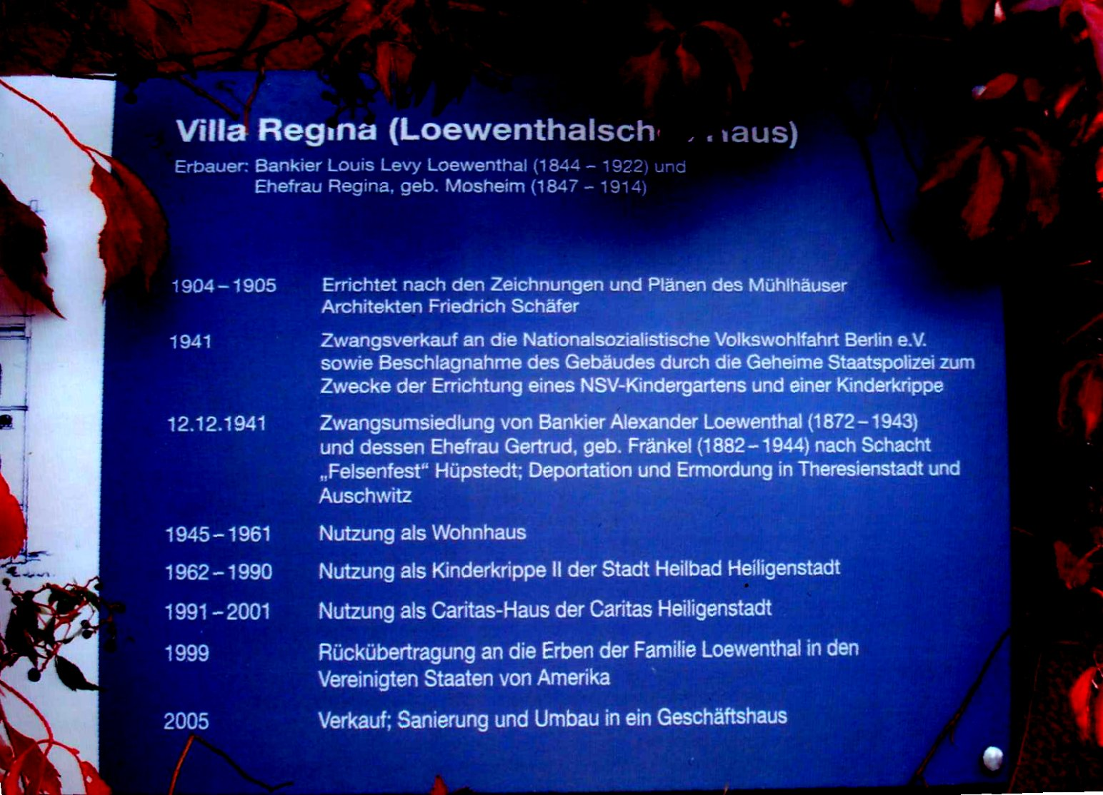 Gedenktafel am Loewenthalschen Haus in Heiligenstadt